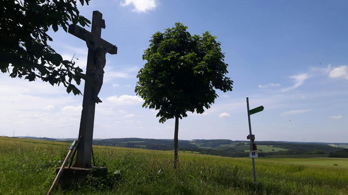 Nr. 13 der in der Dittwarer Ortschronik beschriebenen Bildstöcke und Denkmäler (siehe: Ortschronik). Wetterkreuz (Tauberbischofsheim) Das "Wetterkreuz", auf einem Fünfmärker stehend, wurde 1714 zum „ewigen Andenken“ an einen großen Gewitterschaden errichtet und ist heute auf vielen Wanderkarten ausgewiesen. Sein Postament bildete den Grenzstein zu den ehemaligen Gemarkungen der fünf Altgemeinden (Distelhausen, Dittigheim, Dittwar, Lauda und Oberlauda), deren Ortswappen darauf abgebildet sind. Es steht auf dem fünfeckigen Stein unter zwei Kastanienbäumen, unter die sich die Bauern bei plötzlichen Unwettern flüchteten. Außerdem ist dort die Kreuzung der alten Keltenfernstraßen Neckar-Main und Spessart-Hohenlohe. (Siehe auch: HKV Dittwar, Das Wetterkreuz).